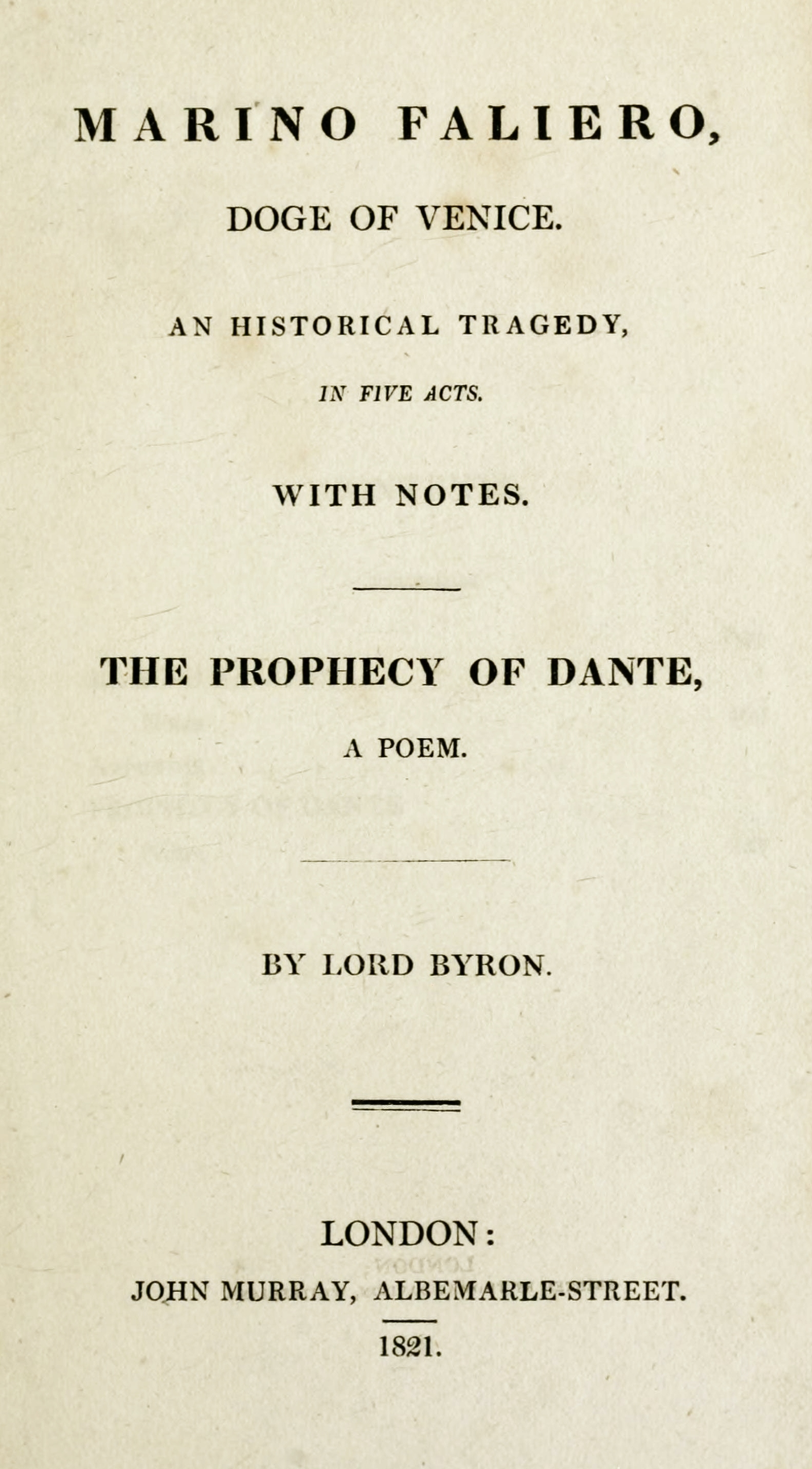 Marino Faliero 1st edition title page